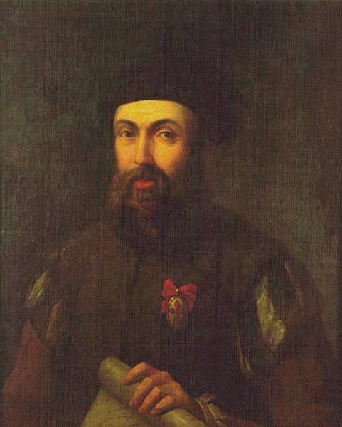 Retrato del militar y navegante portugués Fernando de Magallanes (1480-1521). Este retrato es una variante recortada de la copia que se guarda en el Museo Naval de Madrid; el original, según Vargas Ponce, estaba en 1787 en la casa del canónigo de la catedral de Toledo Felipe Vallejo; fue de esa pintura que Fernando Selma sacó el grabado que figura en la Relación del último viaje al Magallanes (Madrid, 1788). El origen de estas tres obras posiblemente está en una pintura del siglo XVI que existía en la galería del duque de Florencia, atribuida a la escuela de Ángel Broncino.